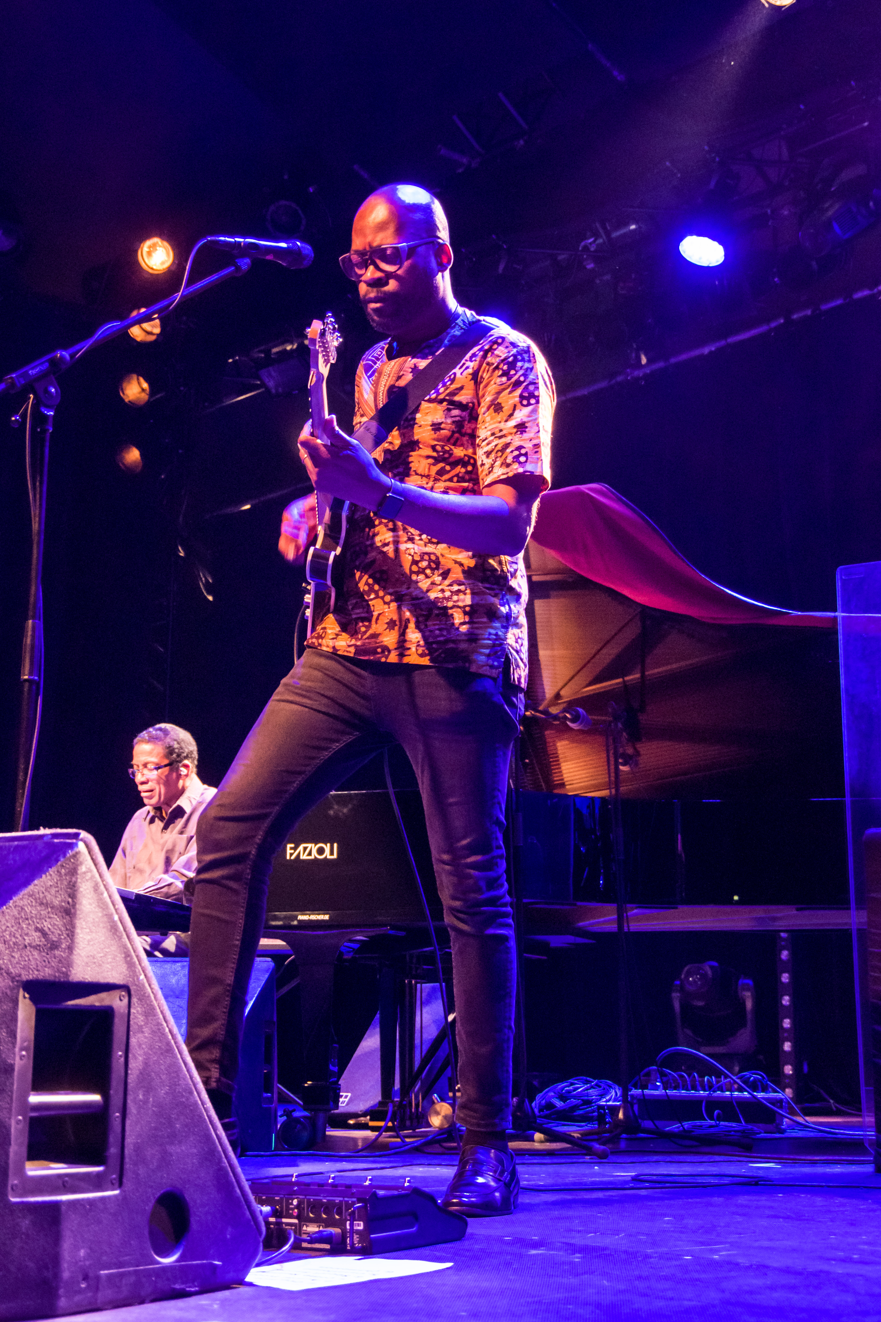 Das Zelt-Musik-Festival 2017 in Freiburg im Breisgau 23.07.2017 Herbie Hancock und Band Pianoː Herbie Hancock Gitarre, Gesangː Lionel Loueke